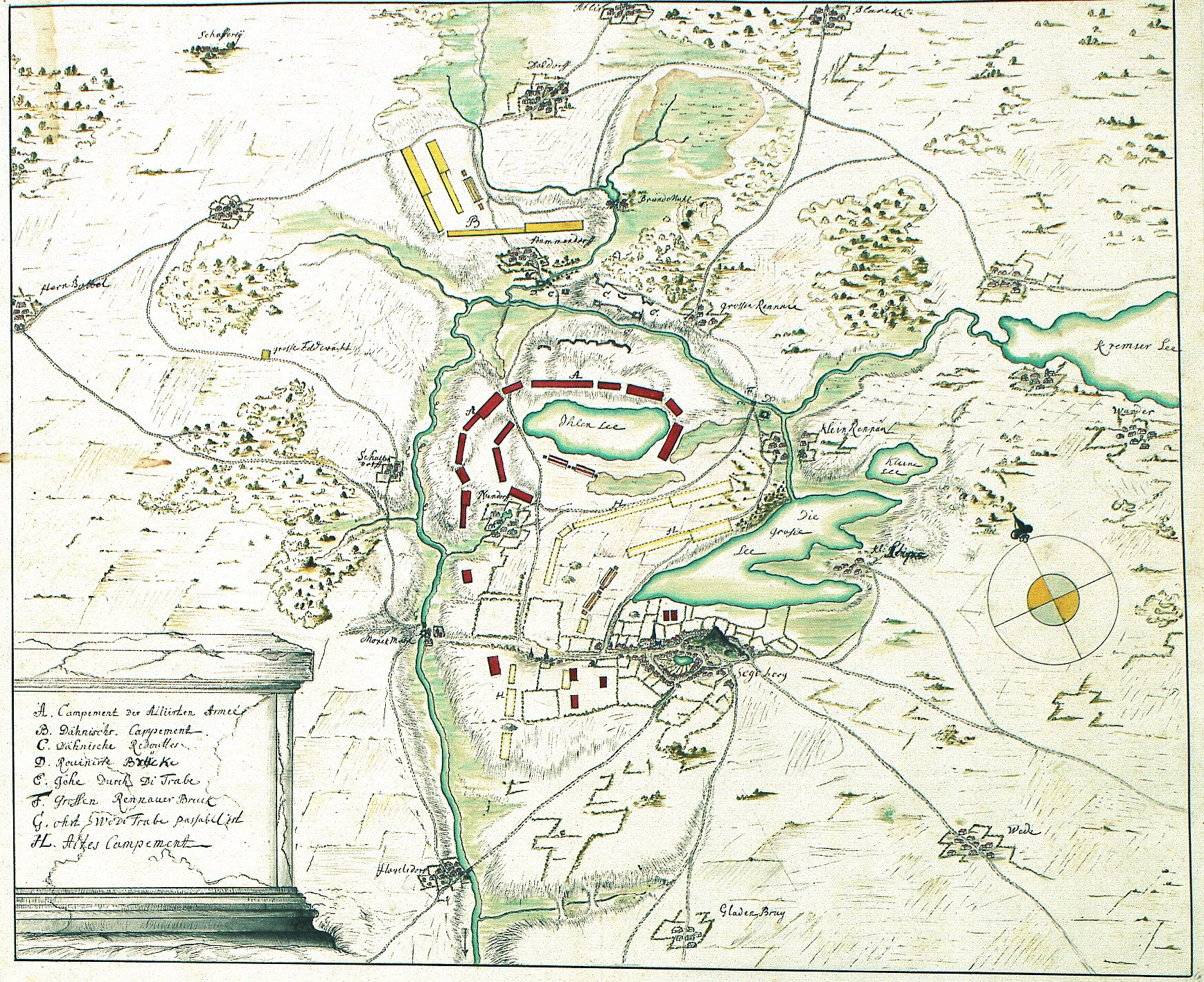 Titel Plan der Feldlager der Alliierten und der Dänen bei Bad Segeberg und Hamdorf, 1700 Urheber o.V. Datum 1700